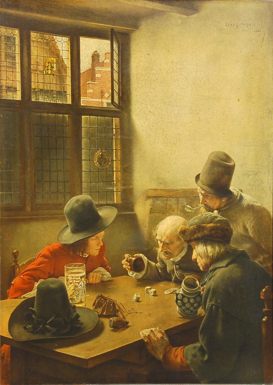 Die Würfelspieler Abmessungen 53 x 68 cm, Signatur oben rechts: Claus Meyer, 1886